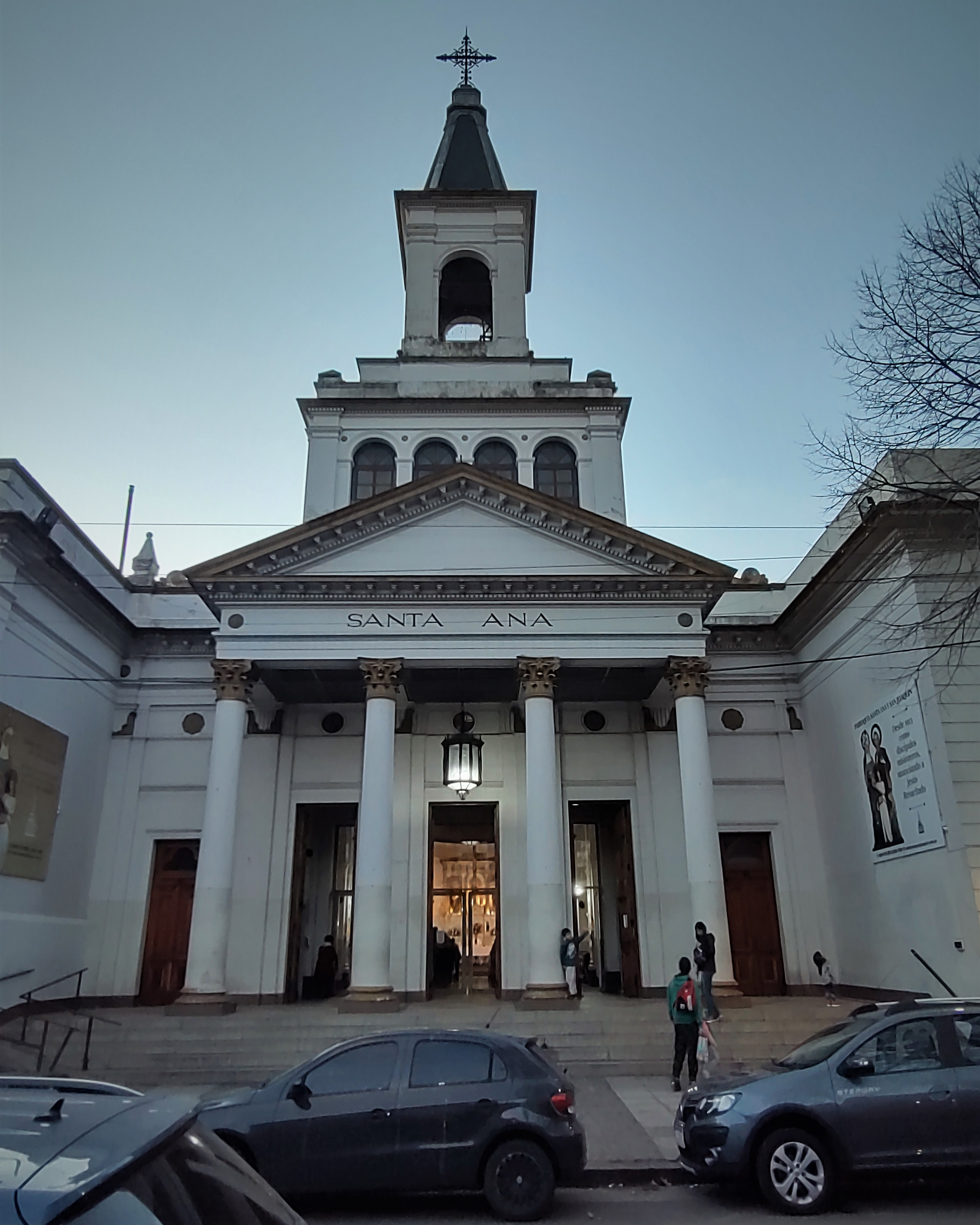 Parroquia Santa Ana, barrio de Villa del Parque, Buenos Aires, Argentina.